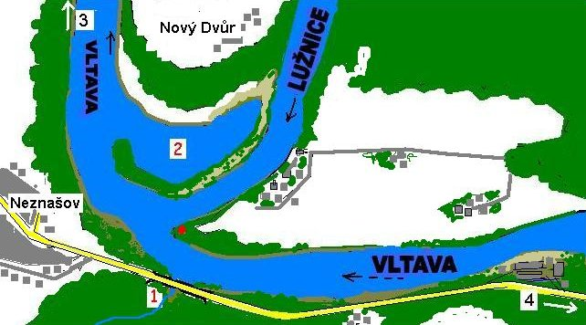 Mapka soutoku Lužnice s Vltavou a okolí